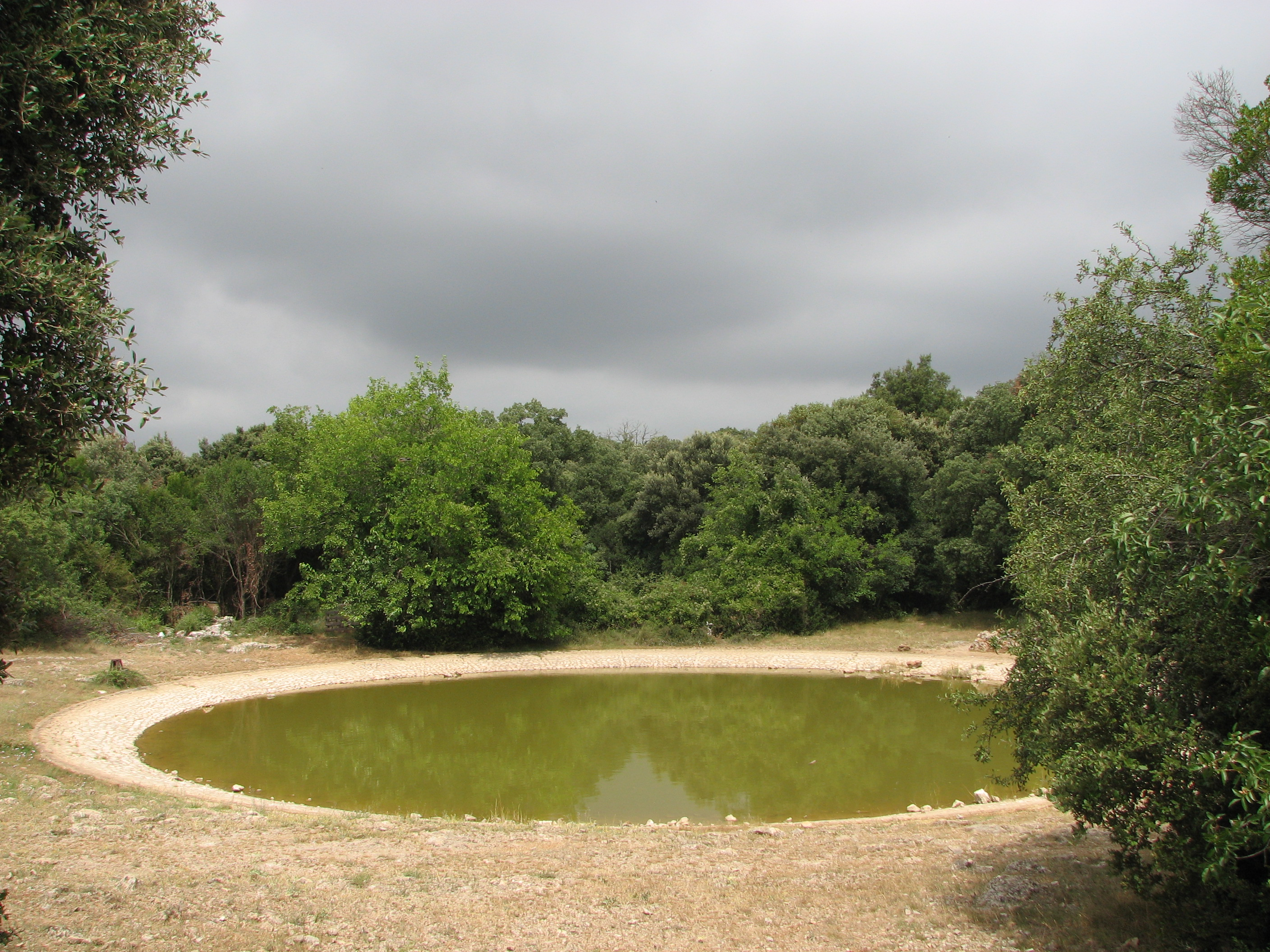 Lavogne de Cambous (Viols-en-Laval, 34)